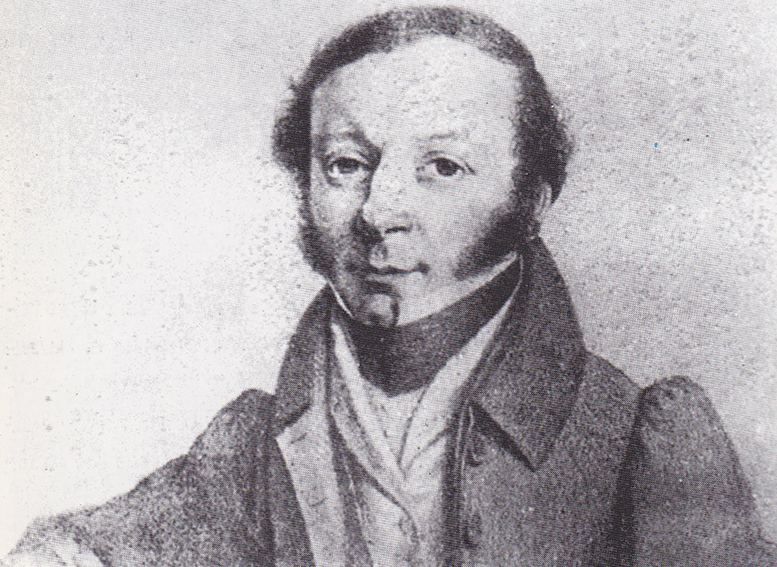 Portrait de François-Antoine-Marie Zola